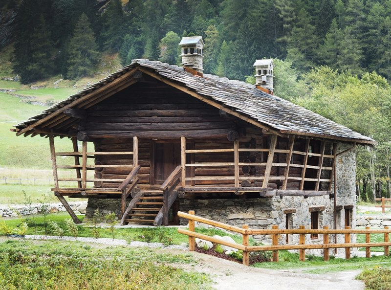 abitazione tipica walser